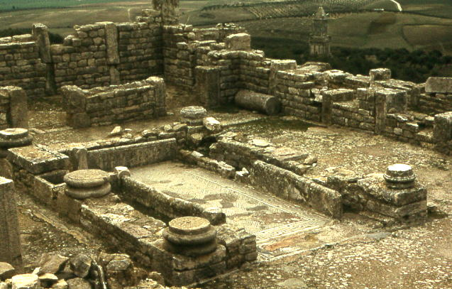 Ruines romaines de Dougga, Tunisie